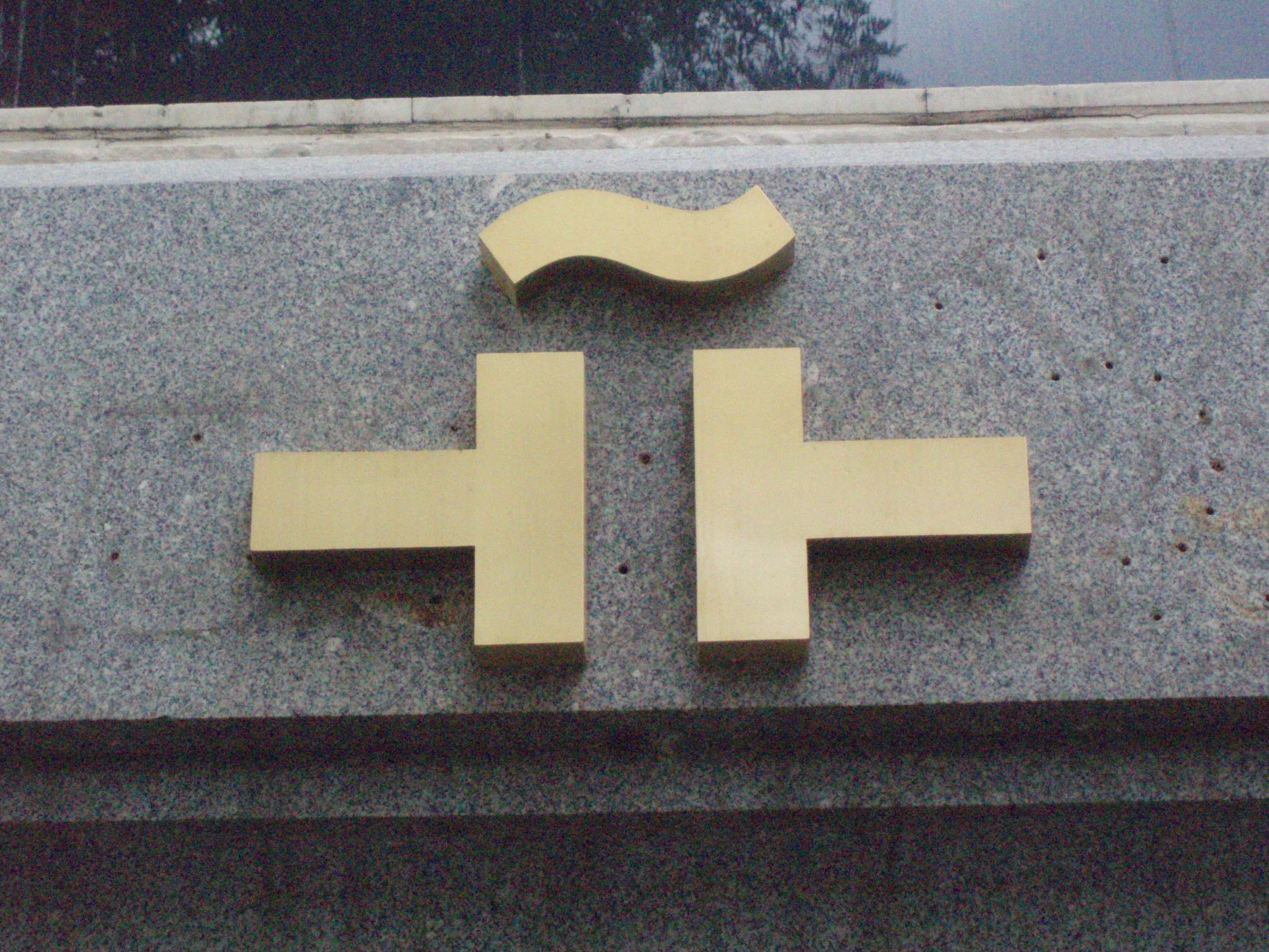 Símbolo del Instituto Cervantes que representa a la lengua española (ñ)